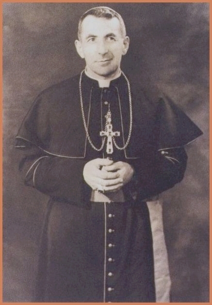 Albino Luciani da vescovo di Vittorio Veneto